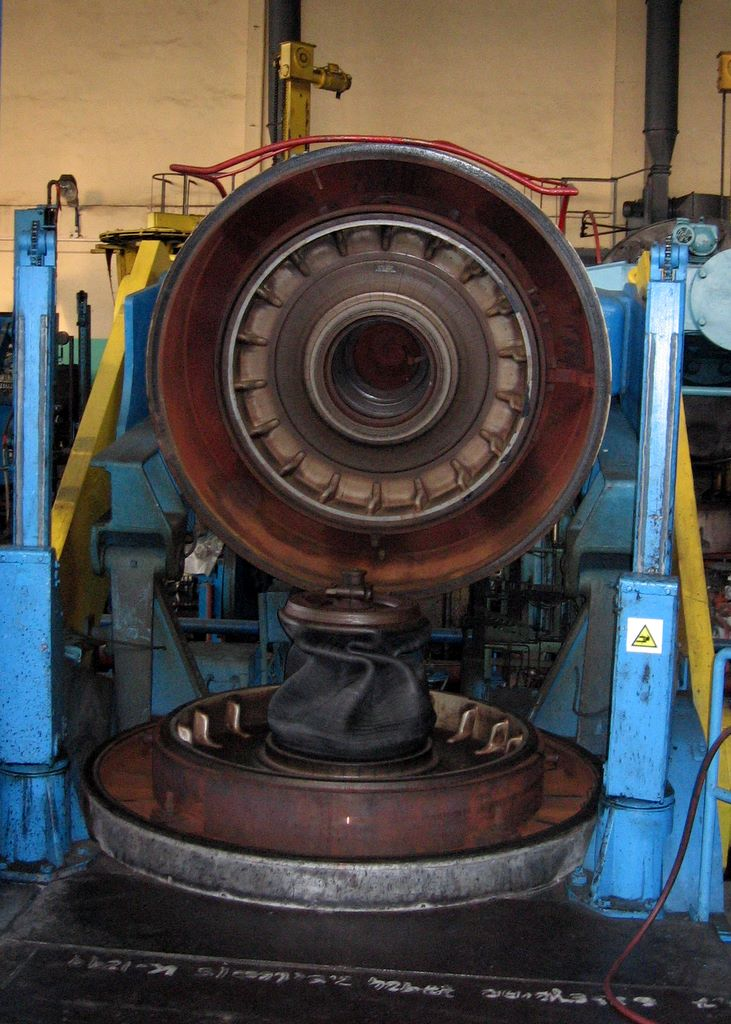 Prasa odlewnicza w wulkanizacji opon ciągnikowych w zakładzie Stomil Poznań